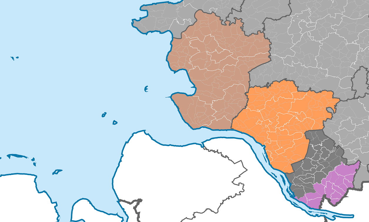 Karte der Amtsgerichtsbezirke im Landgerichtsbezirk Itzehoe Amtsgericht Meldorf Amtsgericht Itzehoe Amtsgericht Elmshorn Amtsgericht Pinneberg